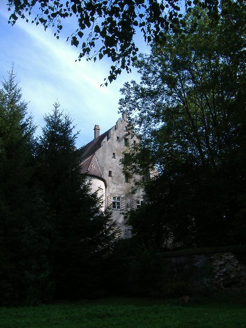 Schloss Bächingen